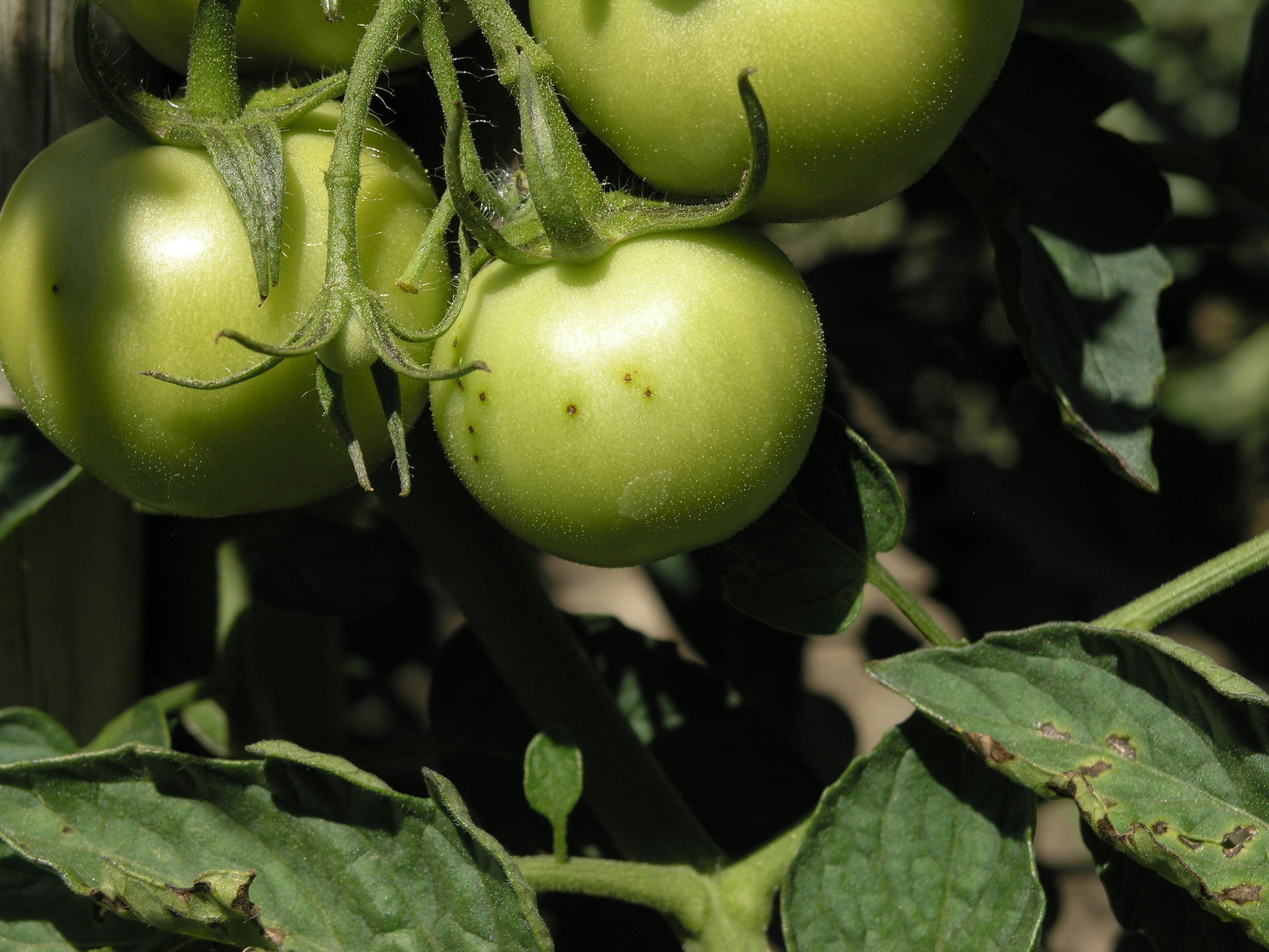 Tomate Frucht Teerflecken / Pseudomonas syringae